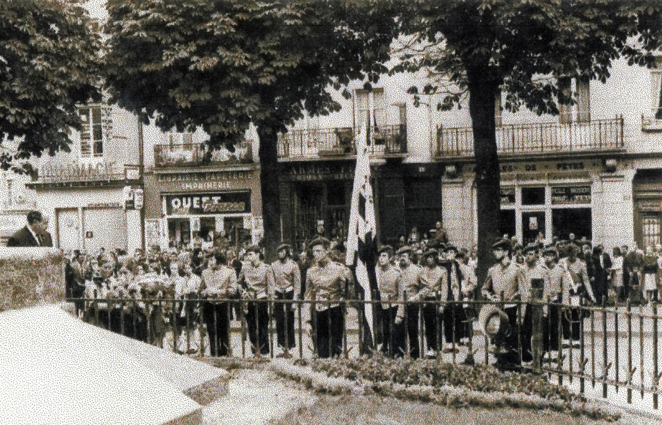 Prestation des scouts du Bagad Bleimor lors d'une cérémonie publique à Fougères (Ille-et-Vilaine) en 1966.